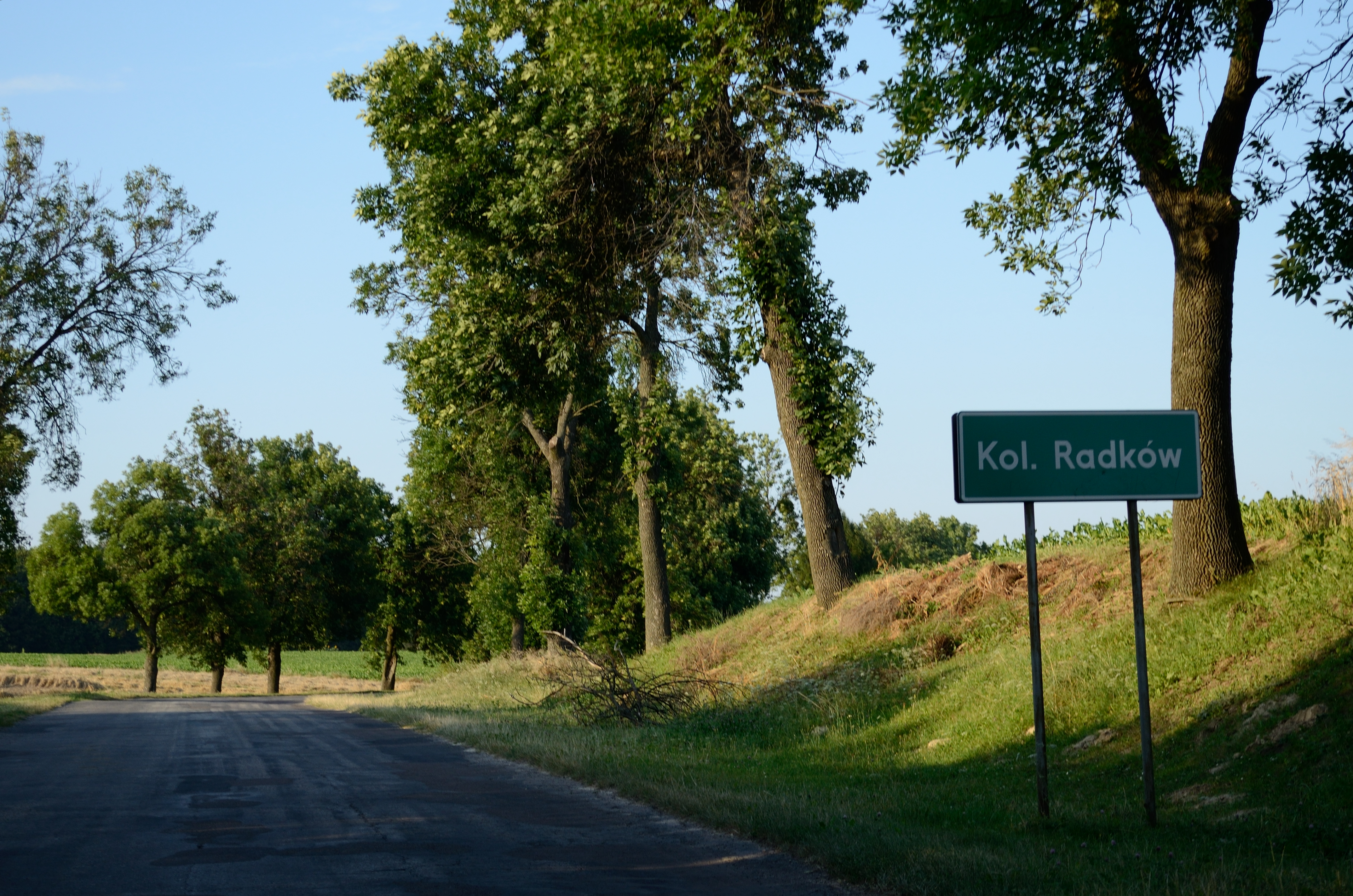 Radków-Kolonia